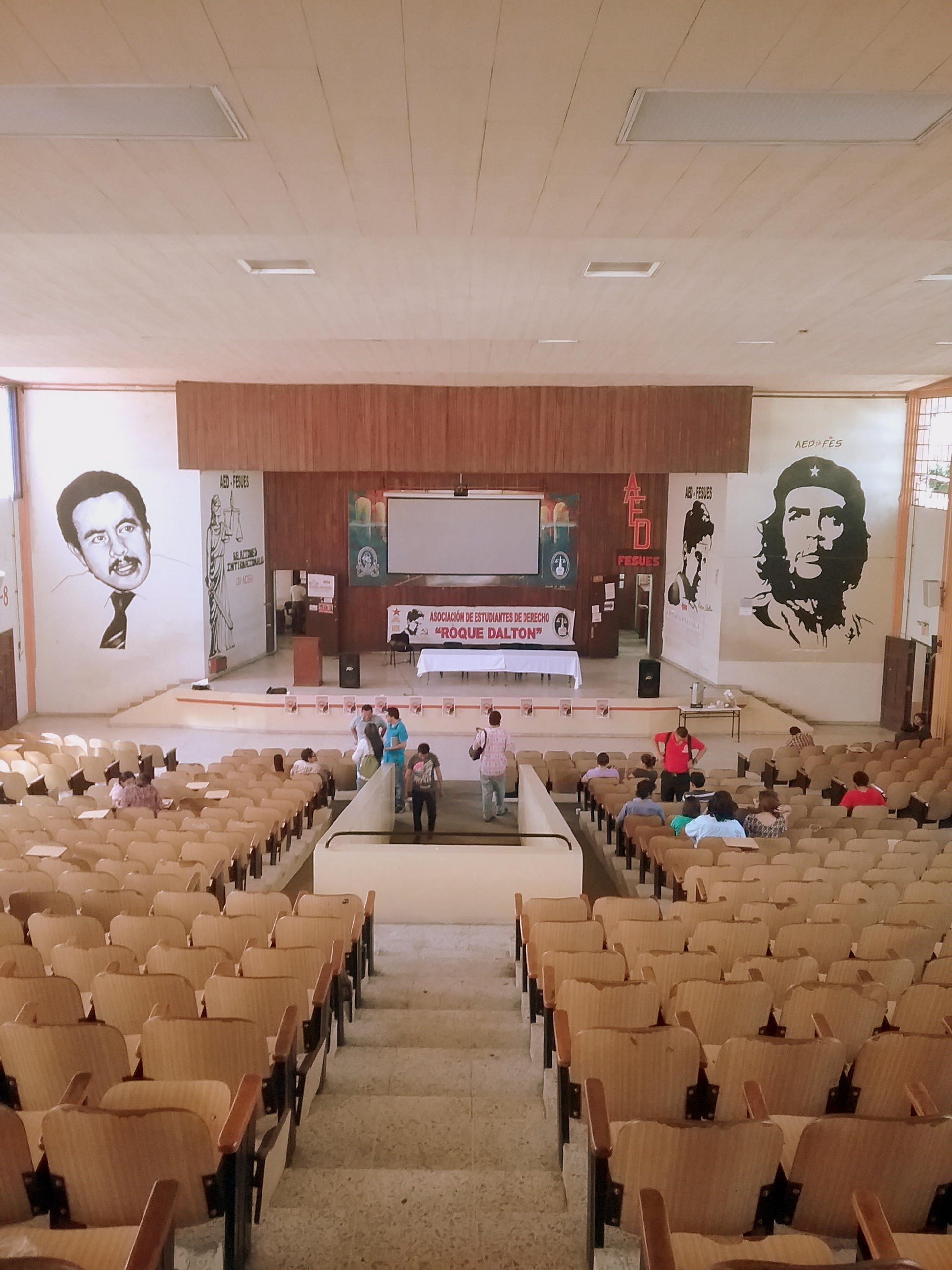 Auditorio Herbert Anaya Sanabria de la Facultad deJurisprudencia y Ciencias Sociales de la Universidad de El Salvador.